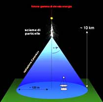 Fascio di luce Cerenkov